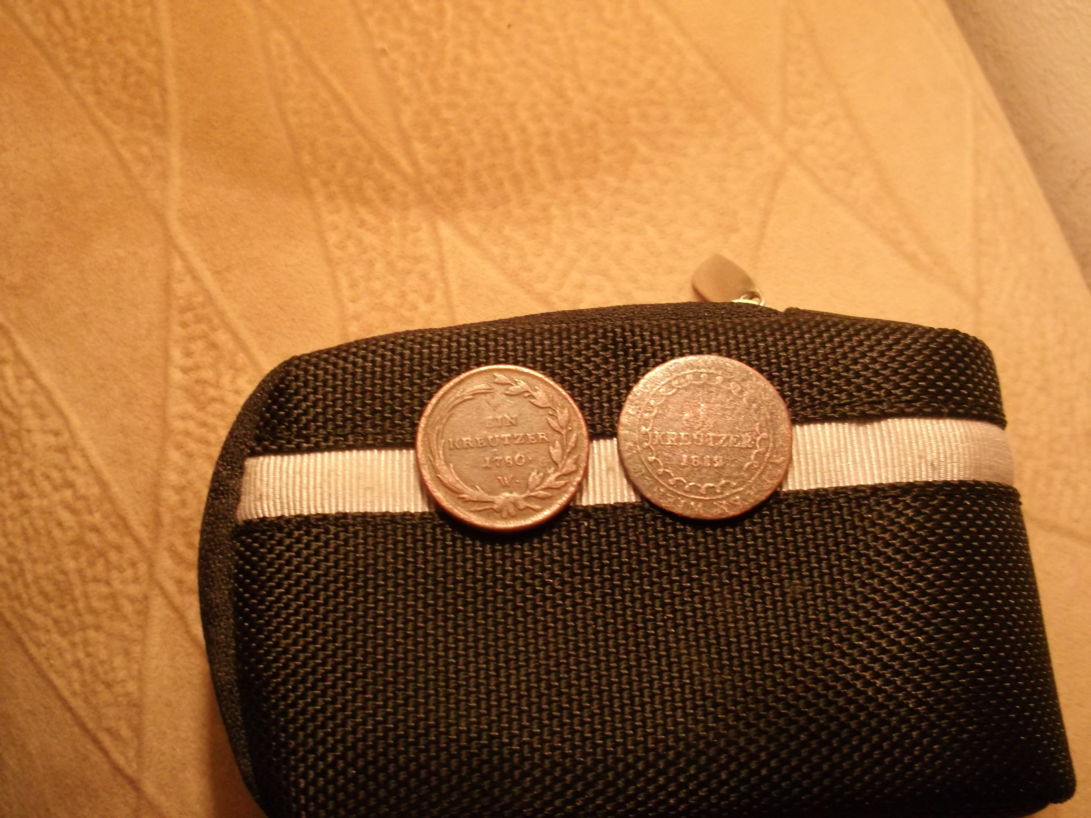 Monede austriece din anul 1780 si 1819 { Creitari } gasite in Aruncuta , jud.Cluj in anul 2000 in gospodaria lui Maria si Pavel Placintar { fata monedelor }.